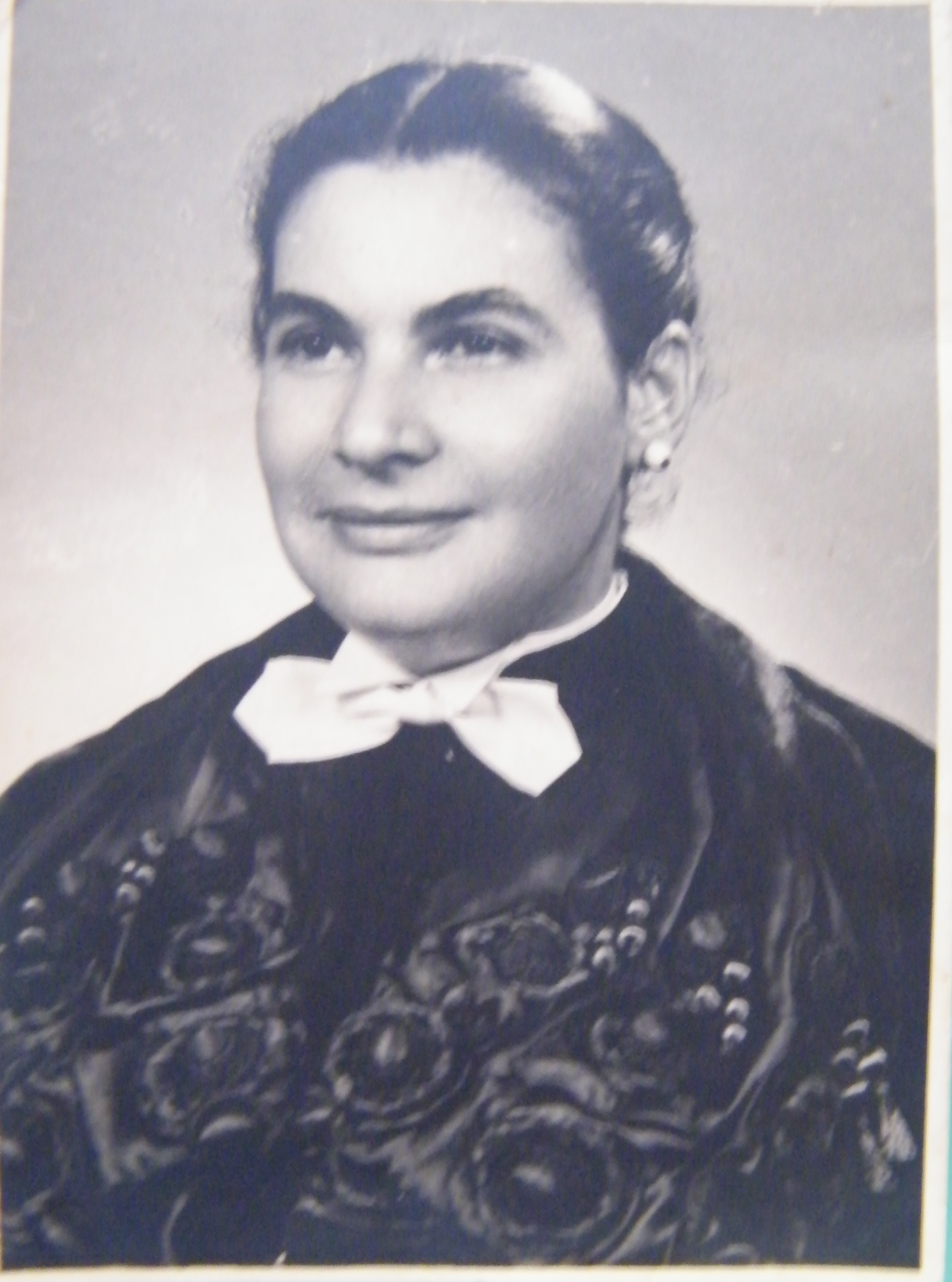 Gina Magnavita